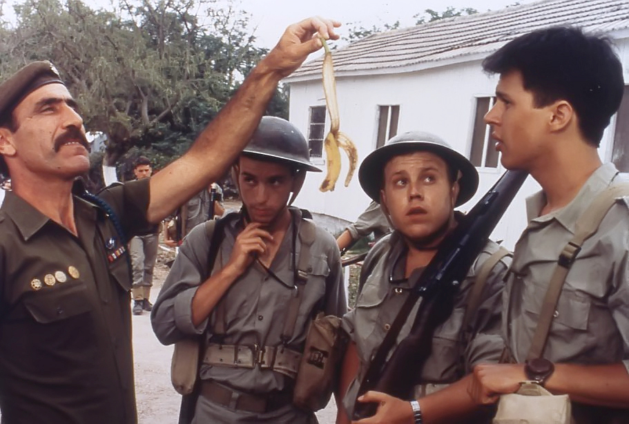 ספיחס